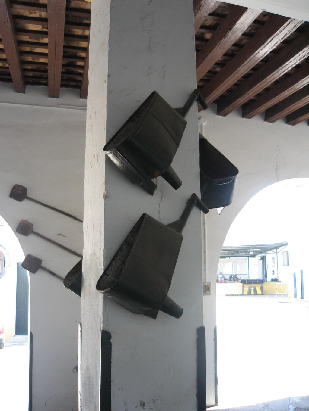 Canoas usadas para el trasiego de´l vino, en una bodega de Bardadillo S. A. en Sanlúcar de Barrameda